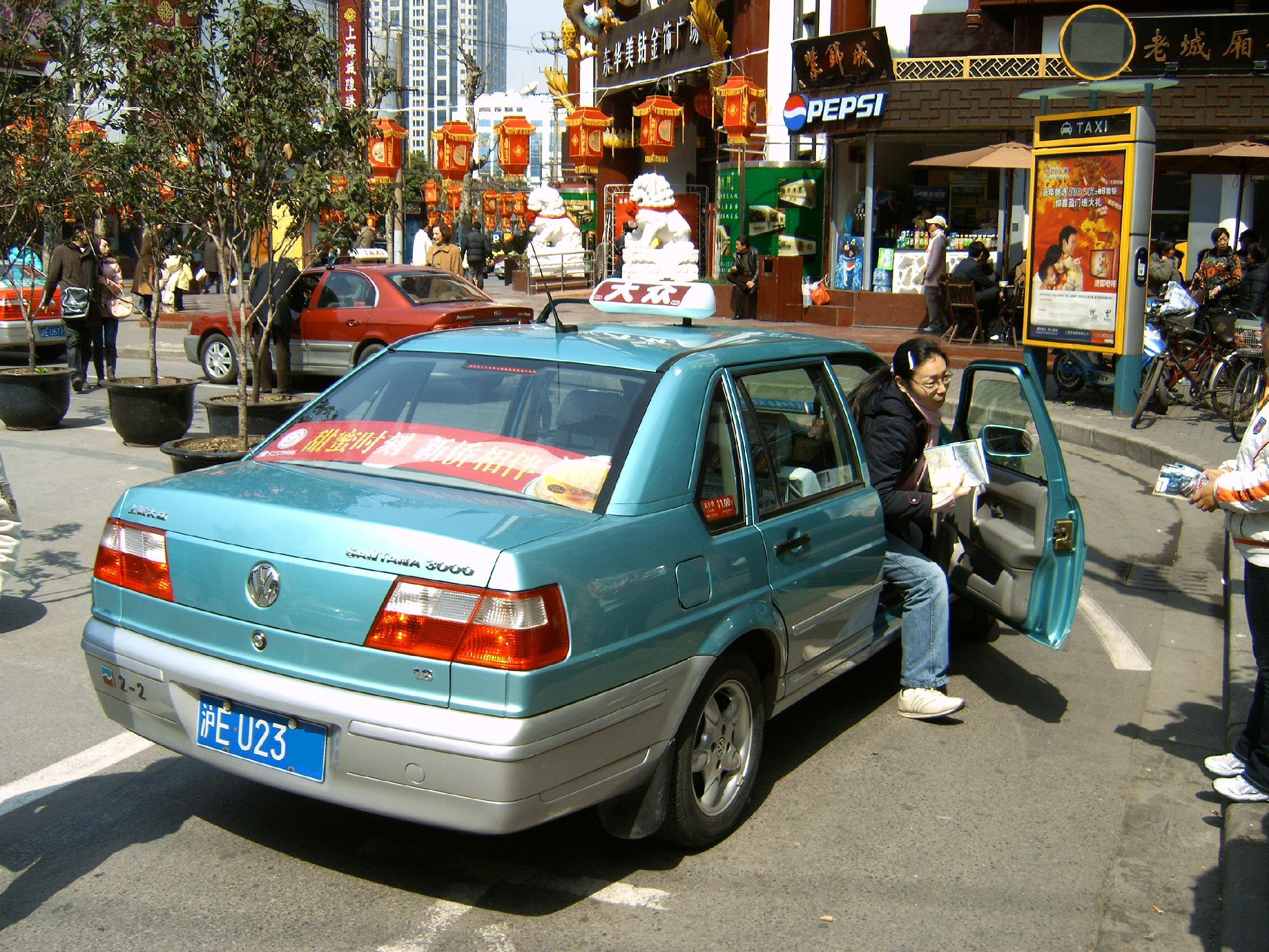 VW Santana 3000 als Taxi in Shanghai.